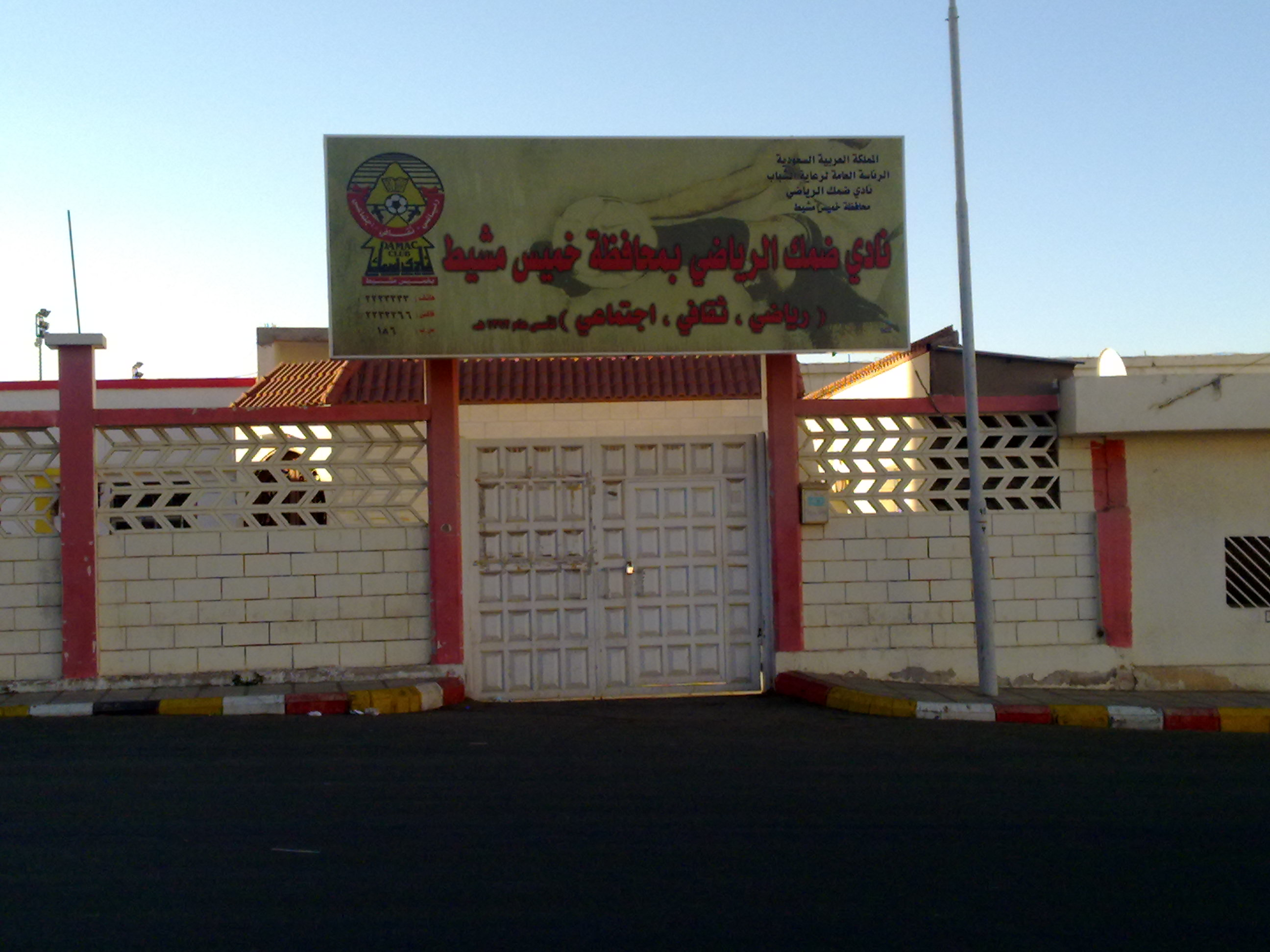 واجهة نادي ضمك في خميس مشيط في المملكة العربية السعودية